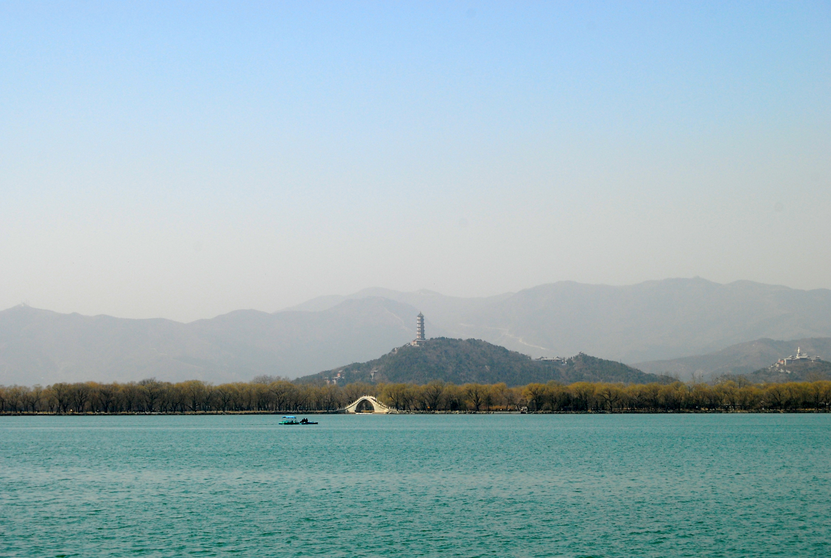 昆明湖南岸远眺万寿山